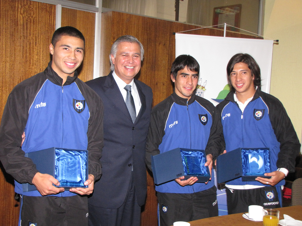 Los jugadores Juan Abarca, Carlos Labrín y David Llanos del Club Deportivo Huachipato, integrantes de la selección sub 20 de Fútbol, que obtuviera el título de campeón del Torneo Esperanzas de Tuolon 2009, fueron distinguidos por la municipalidad de Talcahuano.